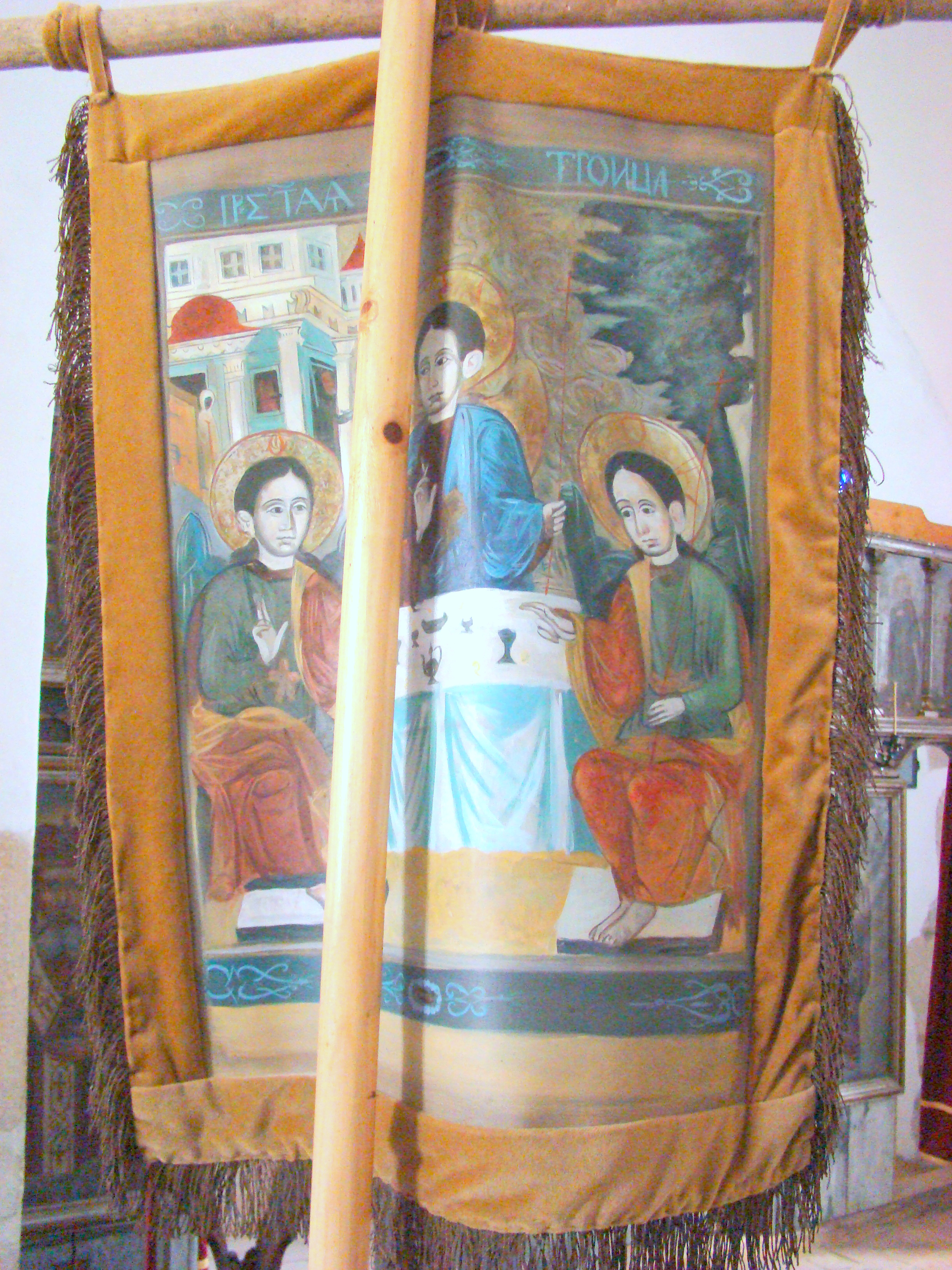 Biserica "Adormirea Maicii Domnului" a mănăstirii Vadului , sat Vad, județul Cluj